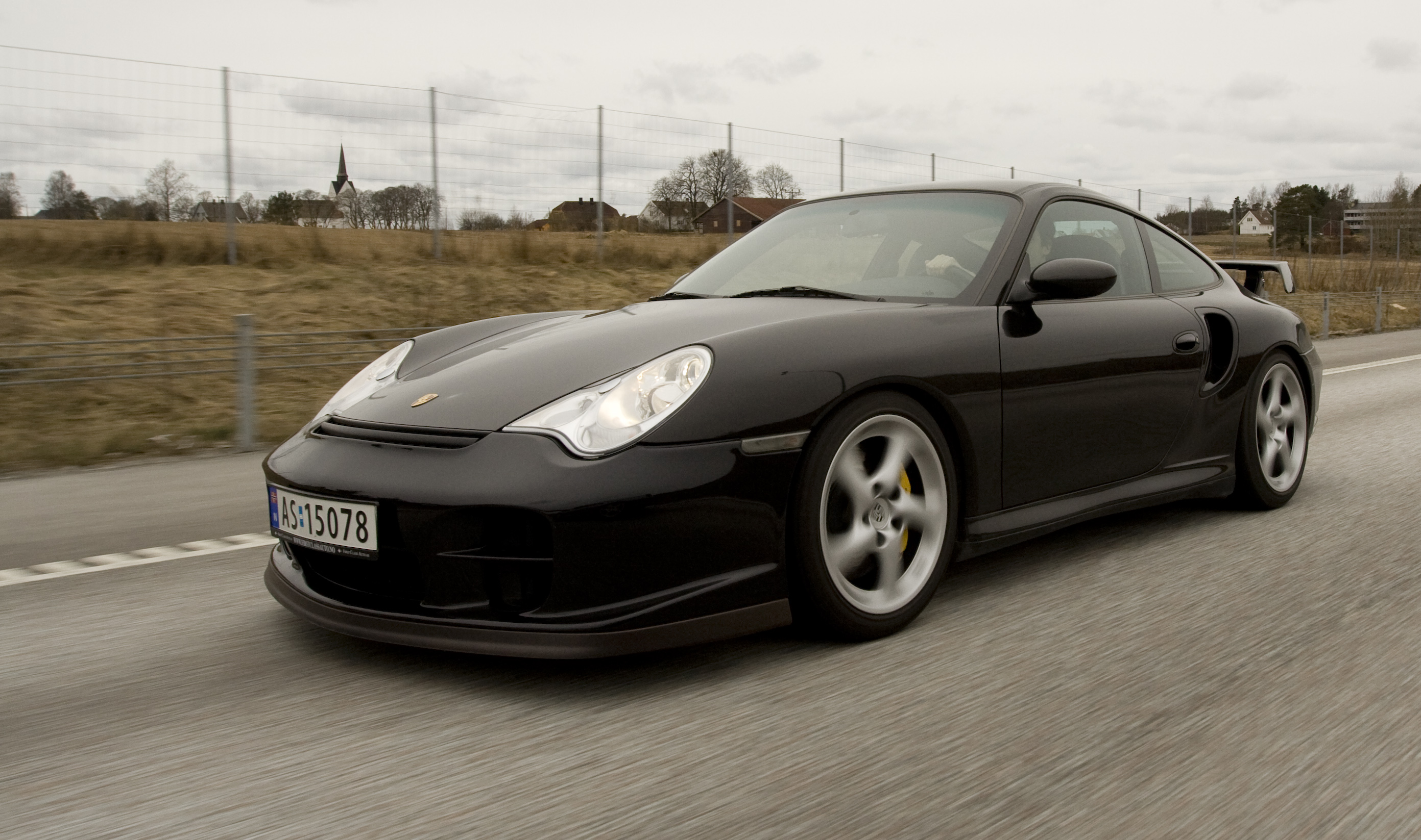 Porsche 911 GT2 (996) + E6GT2 + E6